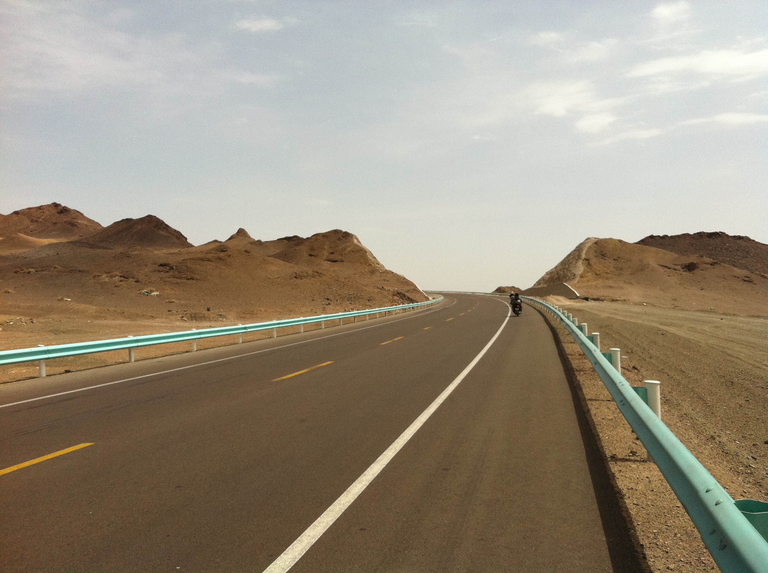 Highway G312 (G30) Xinjiang, China